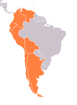 Andské státy Jižní Ameriky